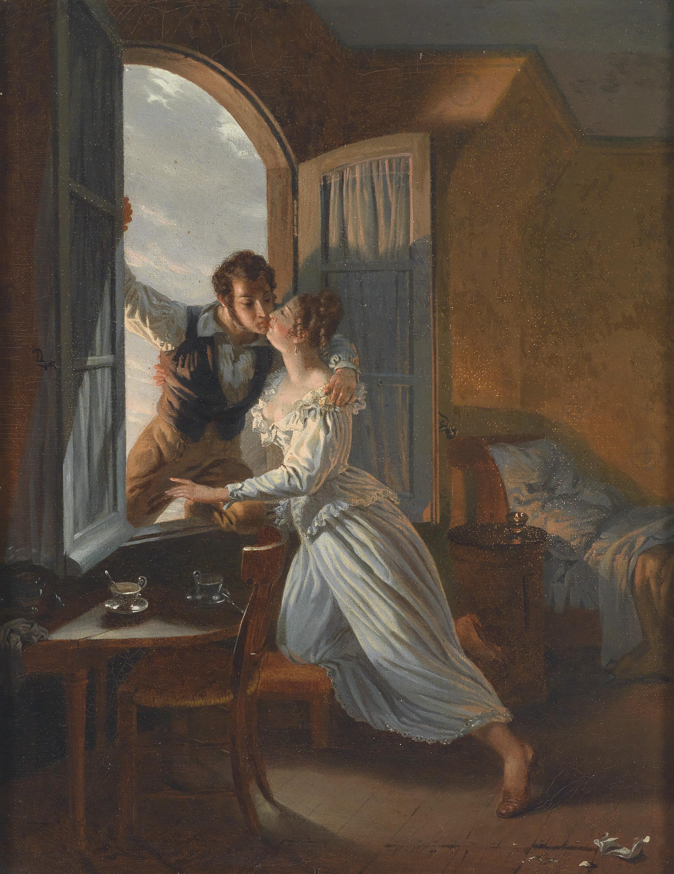 Heimliches Treffen, signiert Lecoeur, Öl auf Leinwand, 41 x 32,5 cm